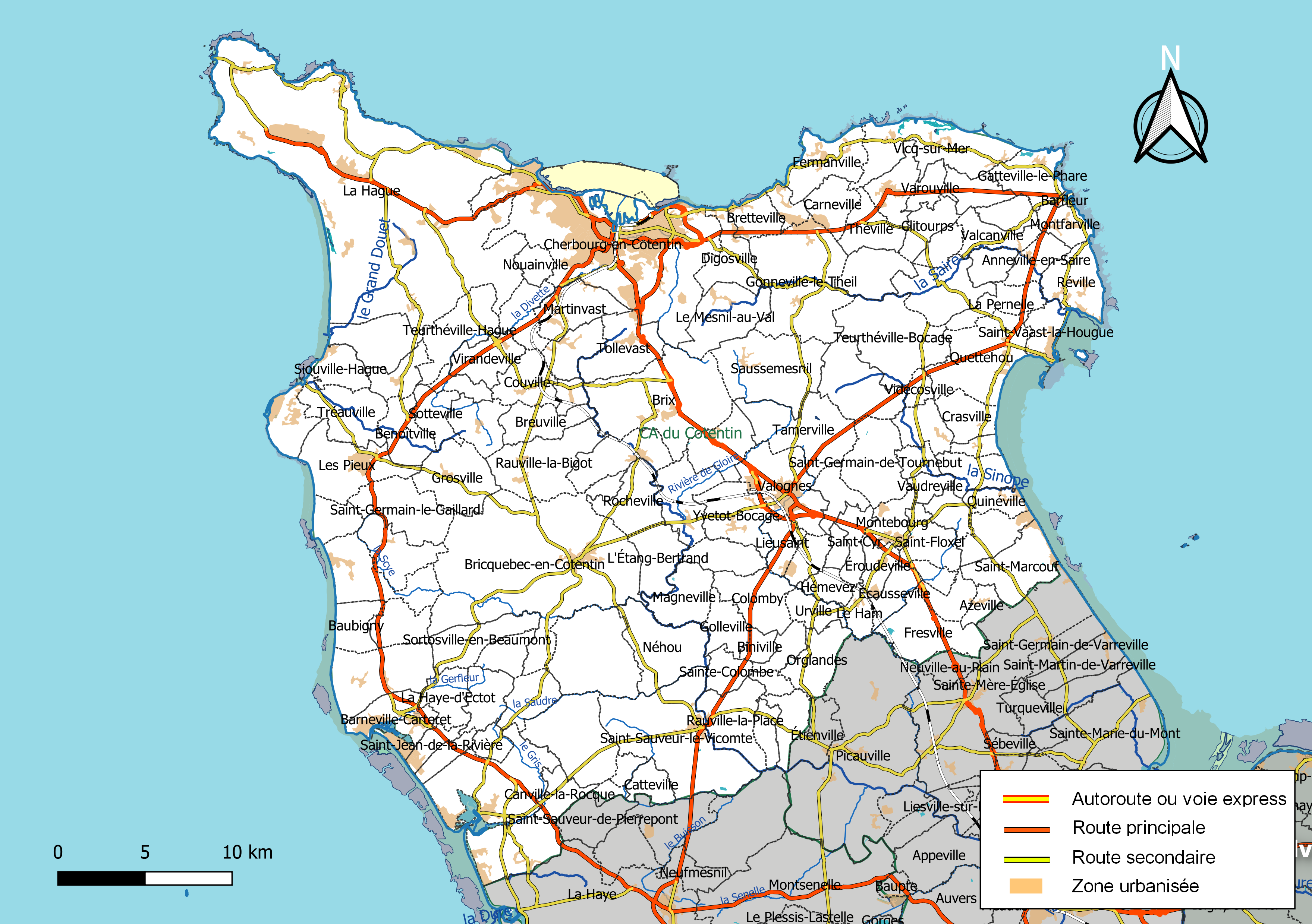 Carte géographique de la Communauté d'agglomération du Cotentin, département de la Manche, France. Composition au 1er janvier 2019.